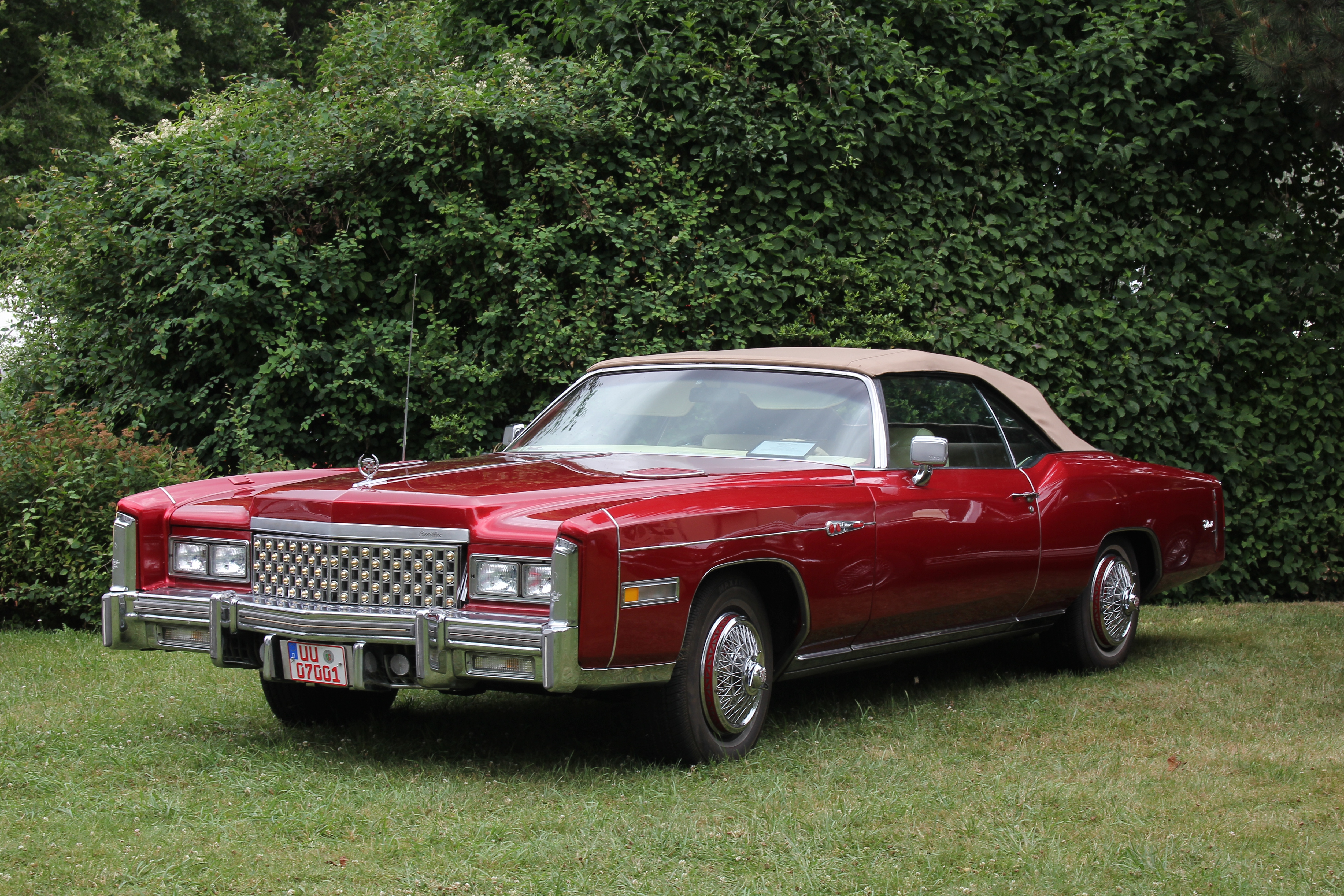 Cadillac Eldorado Cabriolet, Baujahr 1975, 8,2-Liter-Motor, 195 PS, Gewicht des Fahrzeugs: 2,98 Tonnen, Länge: 5,64 Meter, Höchstgeschwindigkeit: 195 km/h, Verbrauch auf 100 km: 22 Liter bei gleichbleibend 100 km/h; Radzierblenden und Dekoration des Kühlergrills nicht original (Kennzeichen verändert)